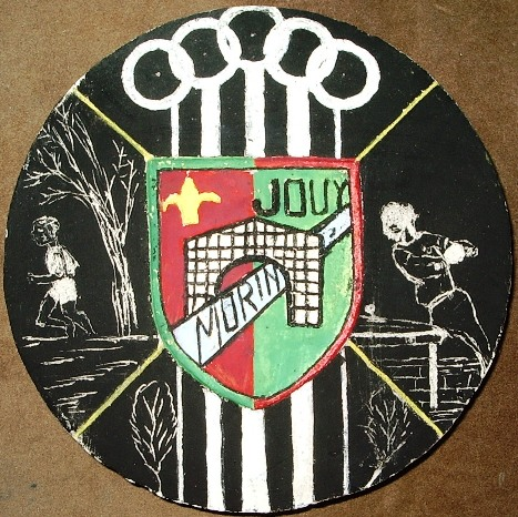 Ce premier blason (partie centrale) a été reproduit sur différents supports. Il s'agit ici d'un modèle peint à la main, réalisé en classe.